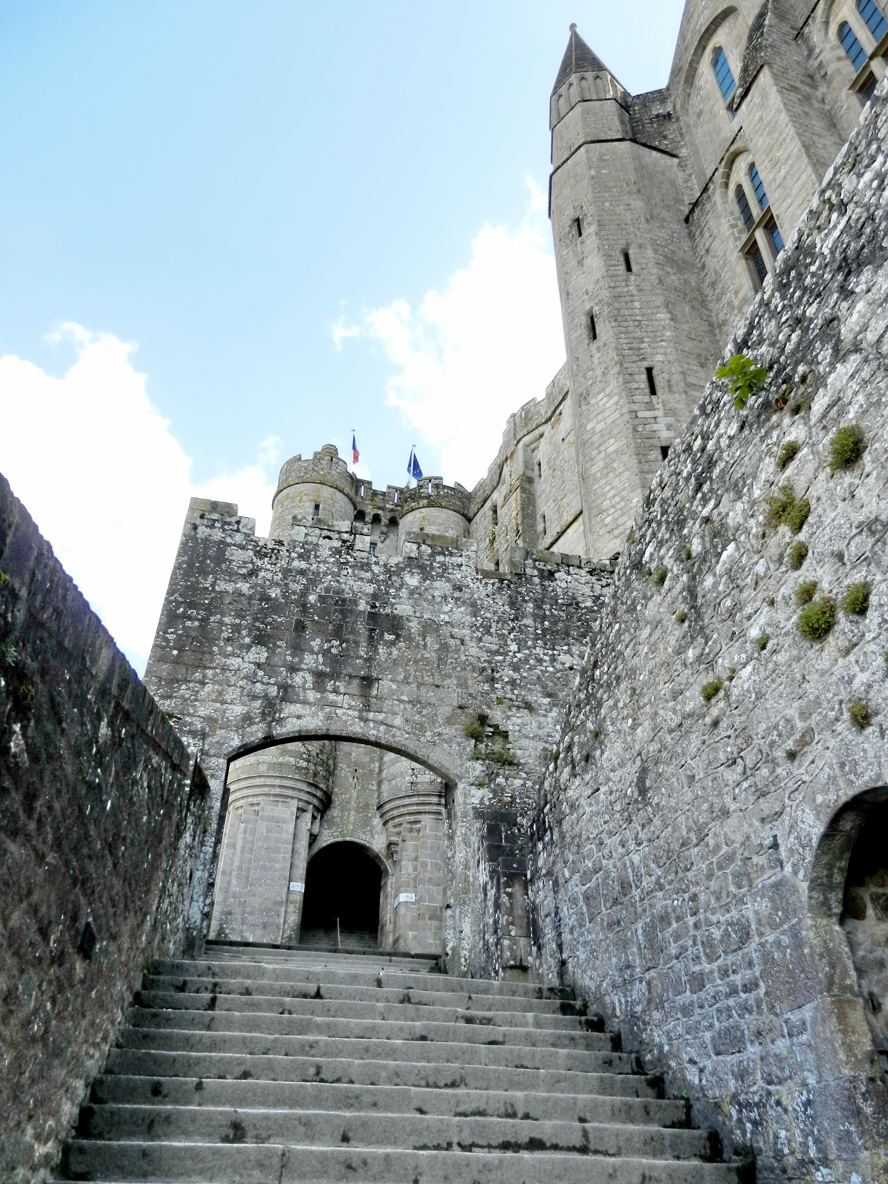 Ле Мон-Сен-Мишель